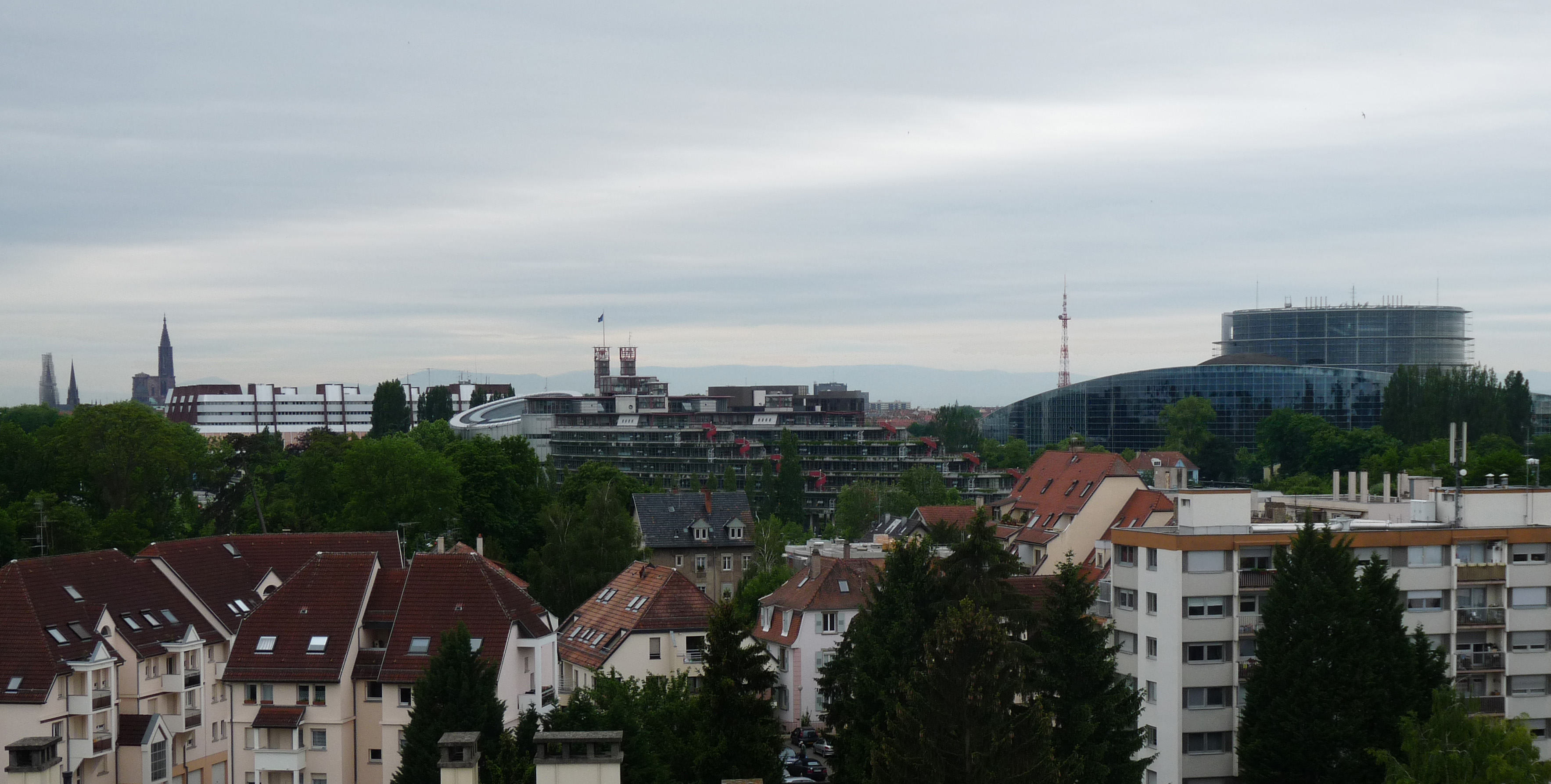 Vue panoramique de Strasbourg depuis le quartier de la Robertsau. A l'arrière-plan, les Vosges. De gauche à droite : l'église Saint-Paul (en travaux), la cathédrale, les institutions européennes.